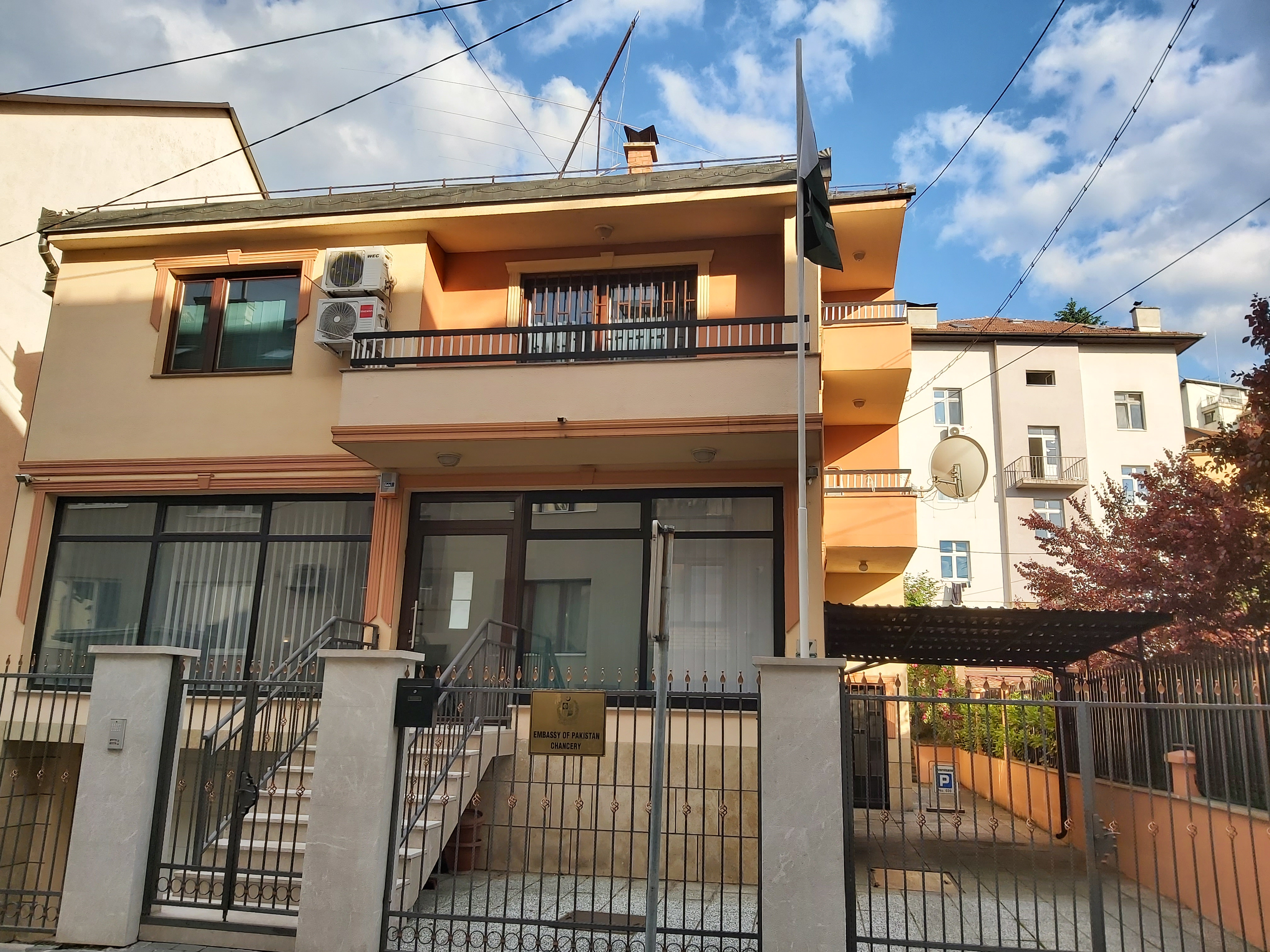 Embassy of Pakistan Bosnia and Herzegovina